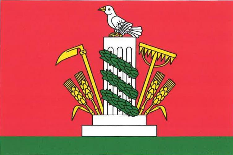 vlajka, Chodovlice, okres Litoměřice